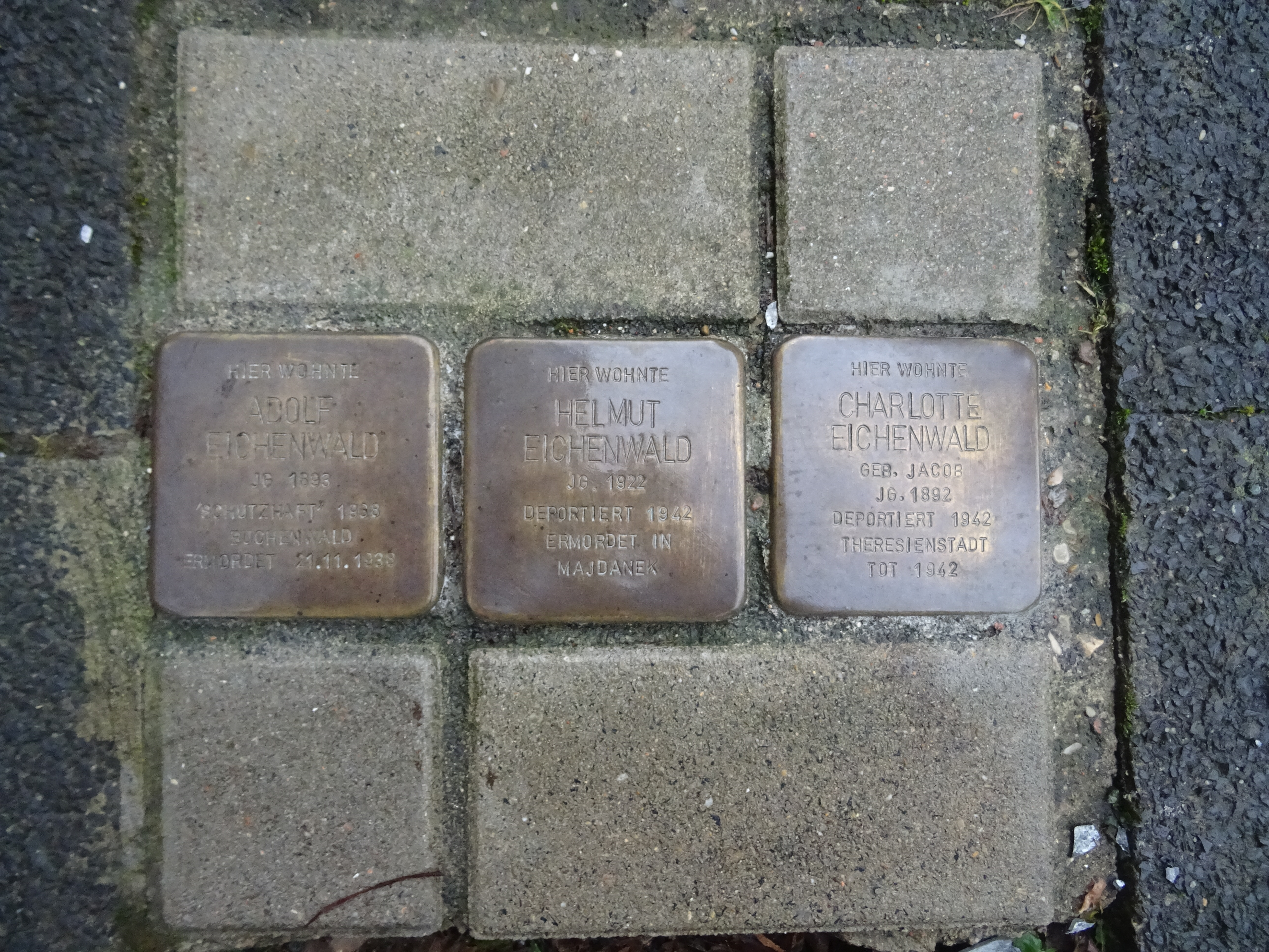 Stolpersteine Biskirchen Auweg 4